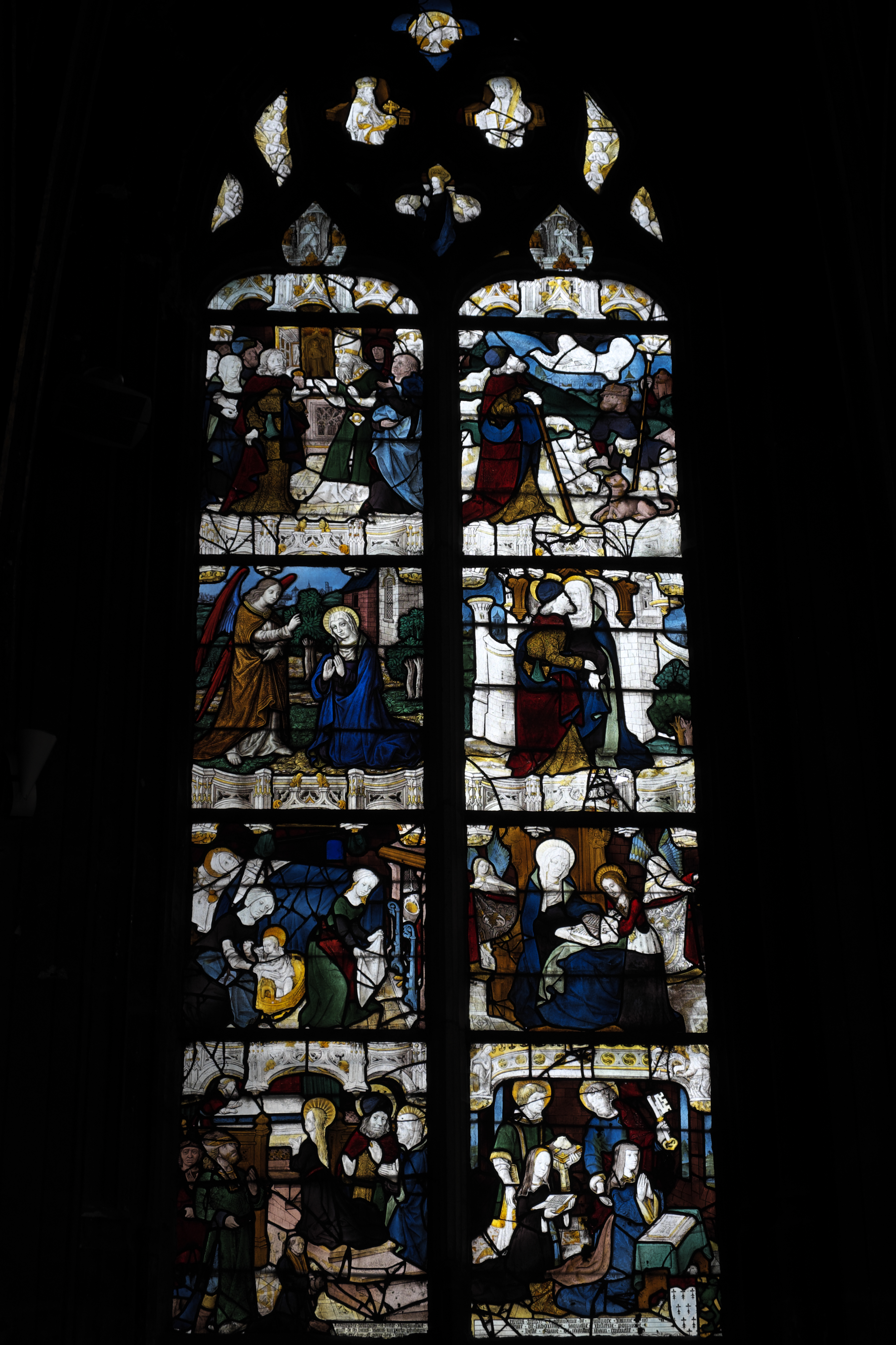 Katholische Kirche Saint-Pierre in Dreux im Département Eure-et-Loir (Centre-Val de Loire/Frankreich), Bleiglasfenster (baie 5) aus dem frühen 16. Jahrhundert im Chor; Darstellung: Geburt und Kindheit Marias, Stifterinnen